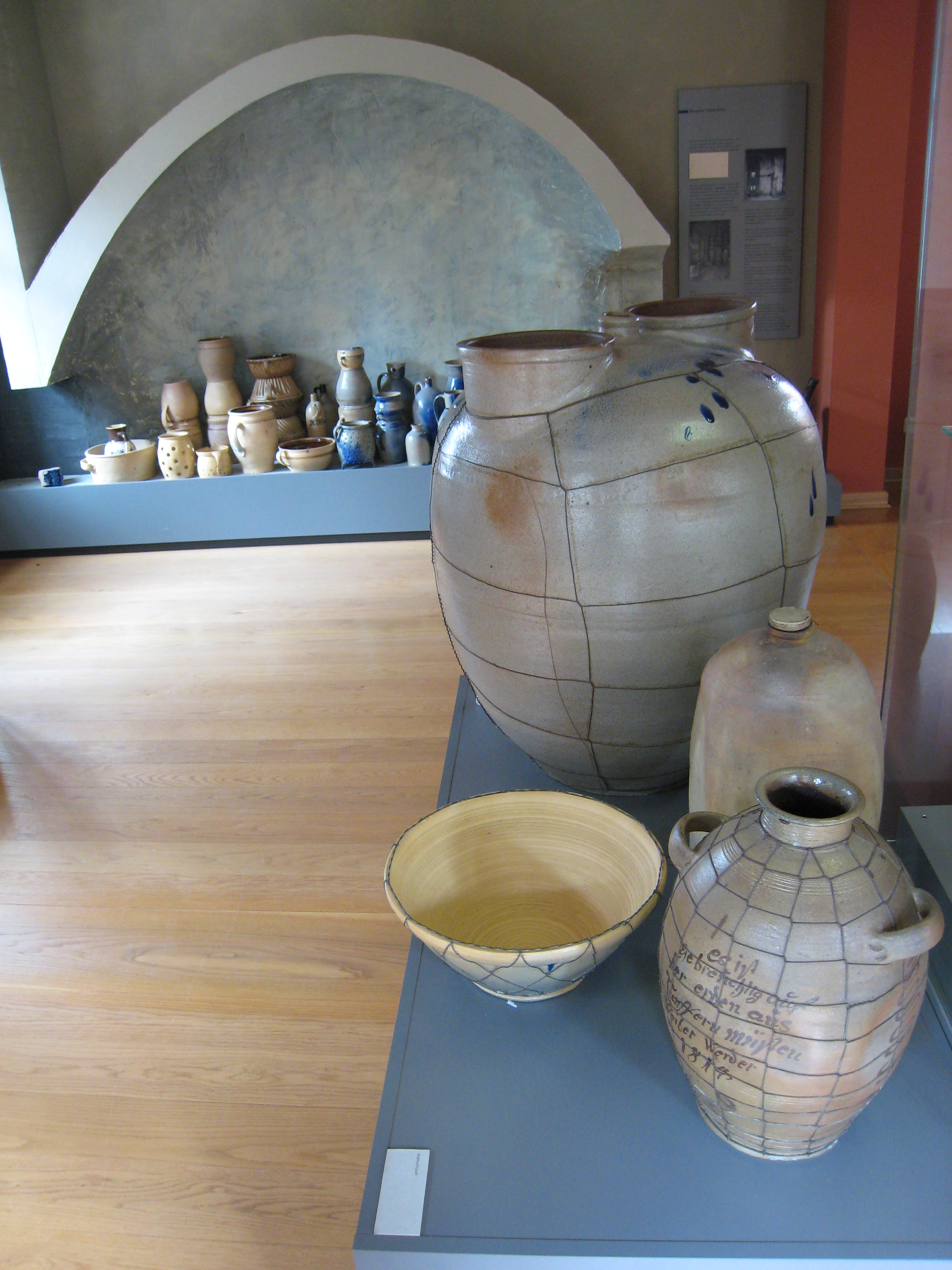 Keramikmuseum Bürgel 2